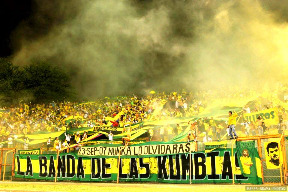 Atlético Bucaramanga